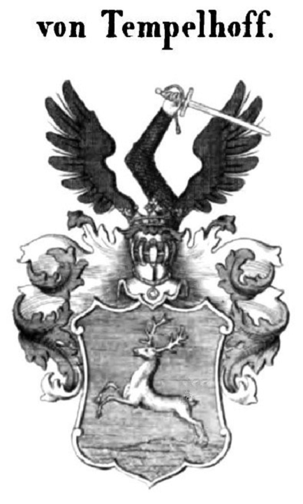 Wappen der von Tempelhoff, Adelsgeschlecht bürgerlicher Herkunft aus der Mark Brandenburg; im Jahr 1784 in den erblichen preußischen Adelstand erhoben.